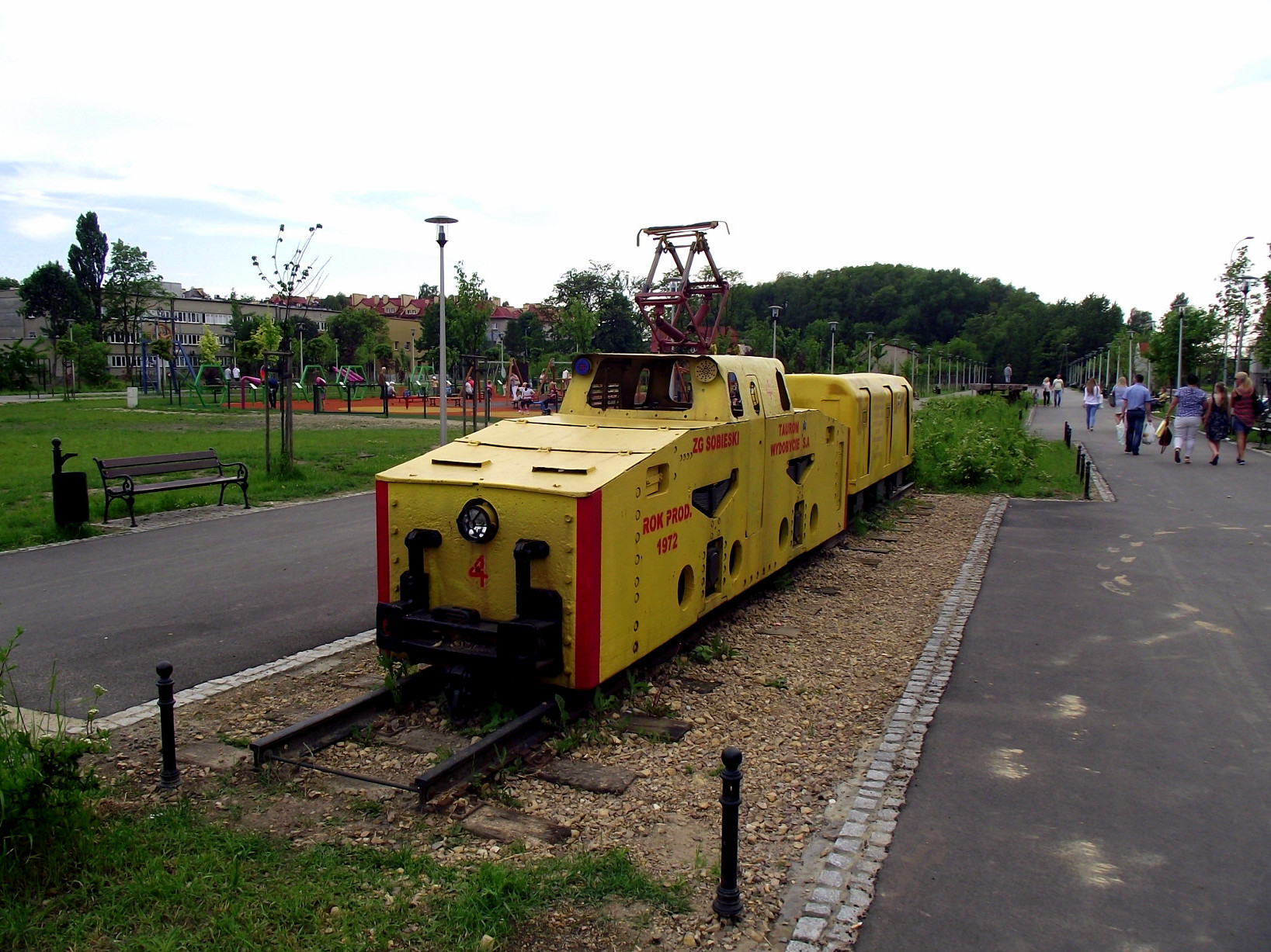 Planty Jaworznickie, pamiątkowy wagonik górniczy.